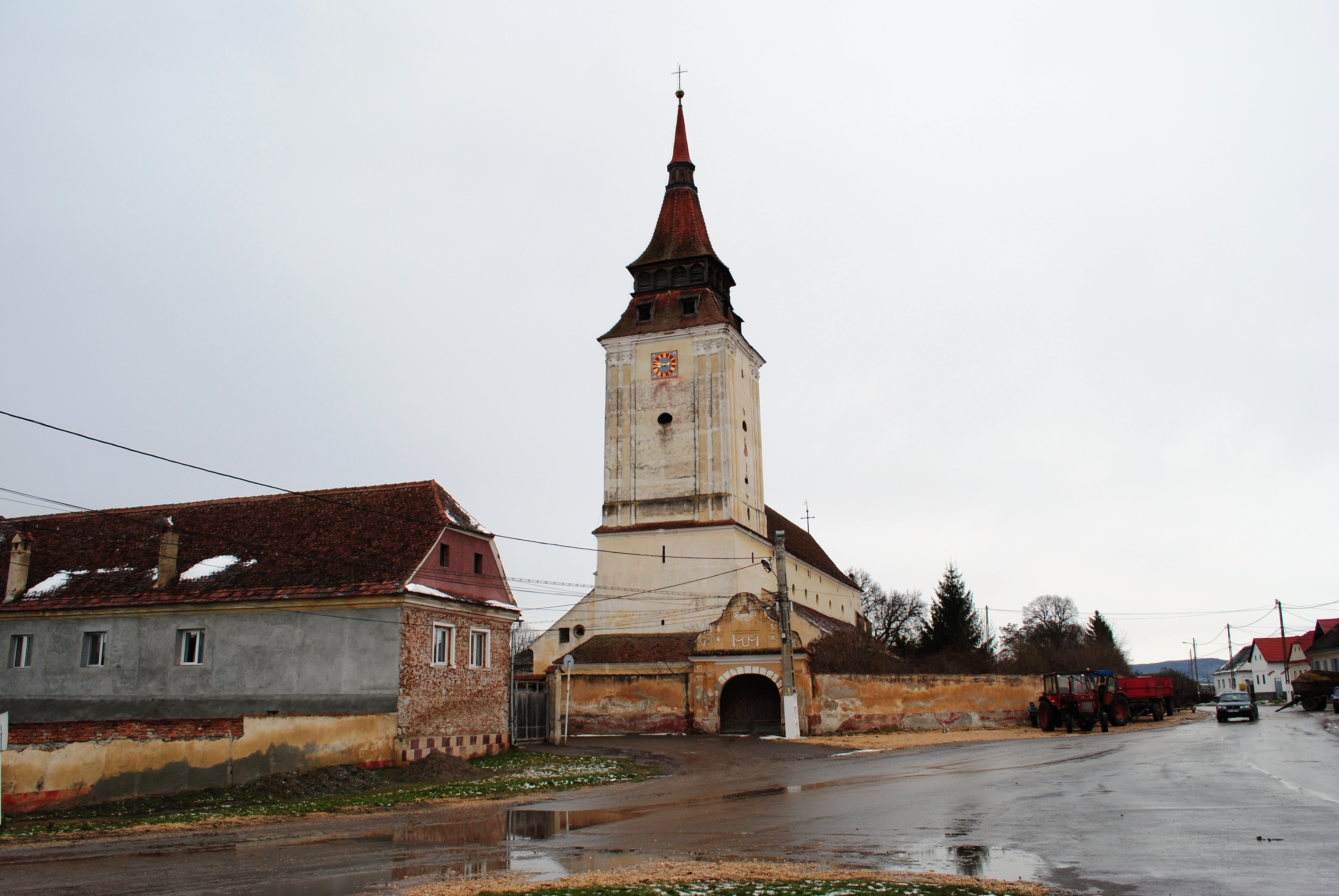 Ansamblul bisericii evanghelice, sec. XIII-XIX